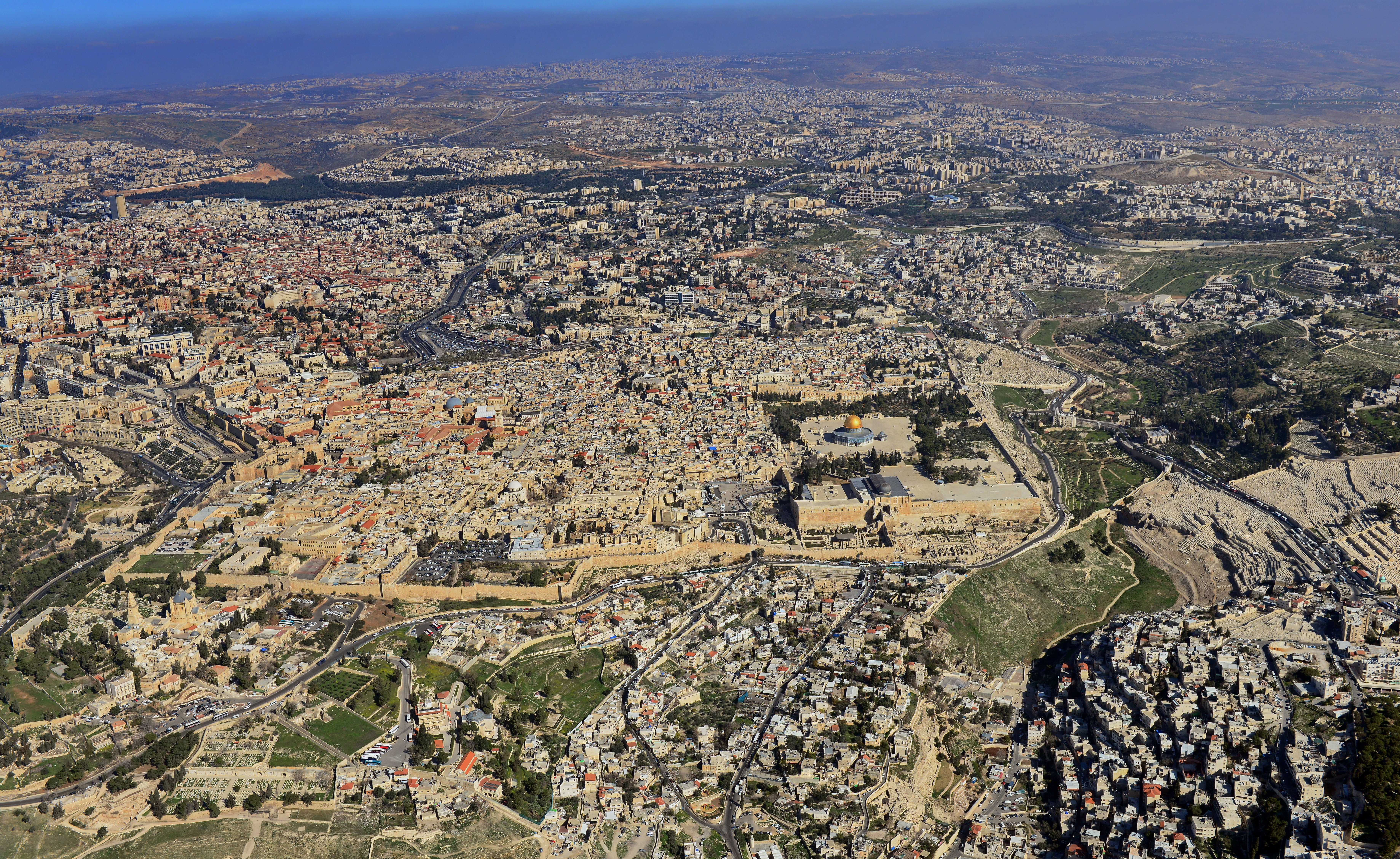 העיר העתיקה בירושלים (בערבית: بلدة القدس القديمة, נהגה: בִּלִדַת אֶלקוּדְס אֶלקָדִימָה) היא האזור העירוני העתיק של ירושלים. שטחה המוקף על ידי חומות ירושלים הוא כ-850 דונם.כמו כן נכללים בעיר העתיקה הר ציון ועיר דוד, הנמצאים מחוץ לחומות, בסמוך ומצד דרום. העיר העתיקה מהווה מוקד משיכה מרכזי לתיירים בני דתות ואומות שונות, אשר באים מרחבי העולם לבקר את האתרים הקדושים הנמצאים בה, ובהם: הר הבית, הכותל המערבי וכנסיית הקבר.